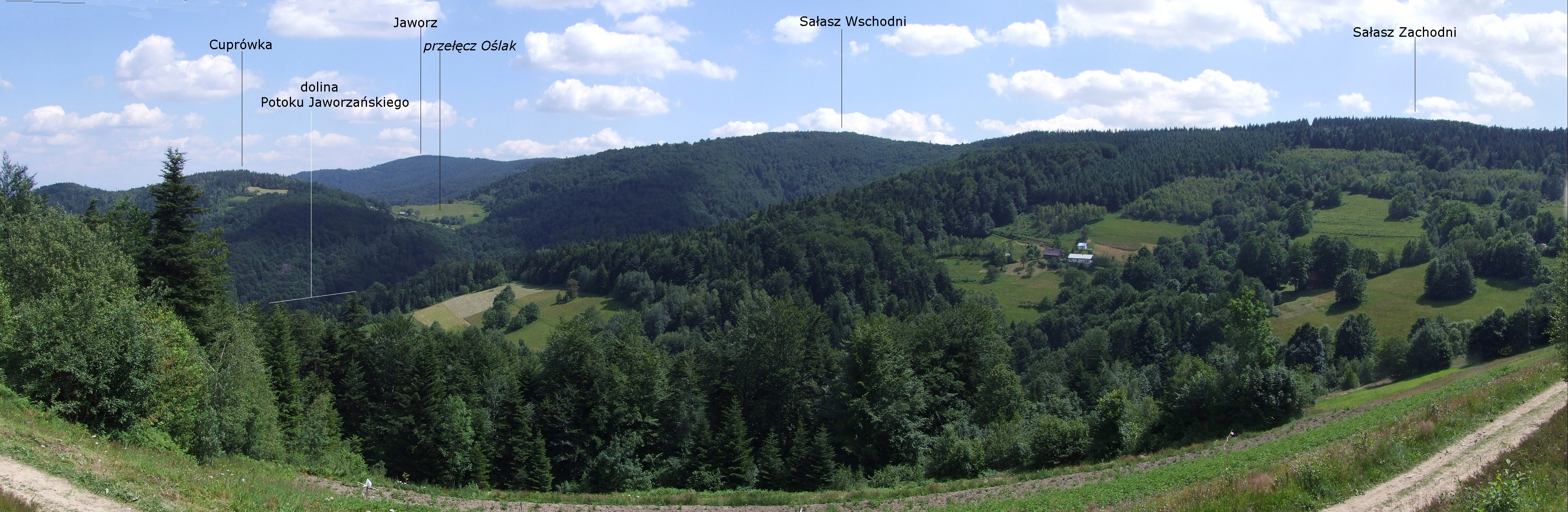 Widok ze stoków Korabia na Pasmo Łososińskie i górne osiedla miejscowości Jaworzna